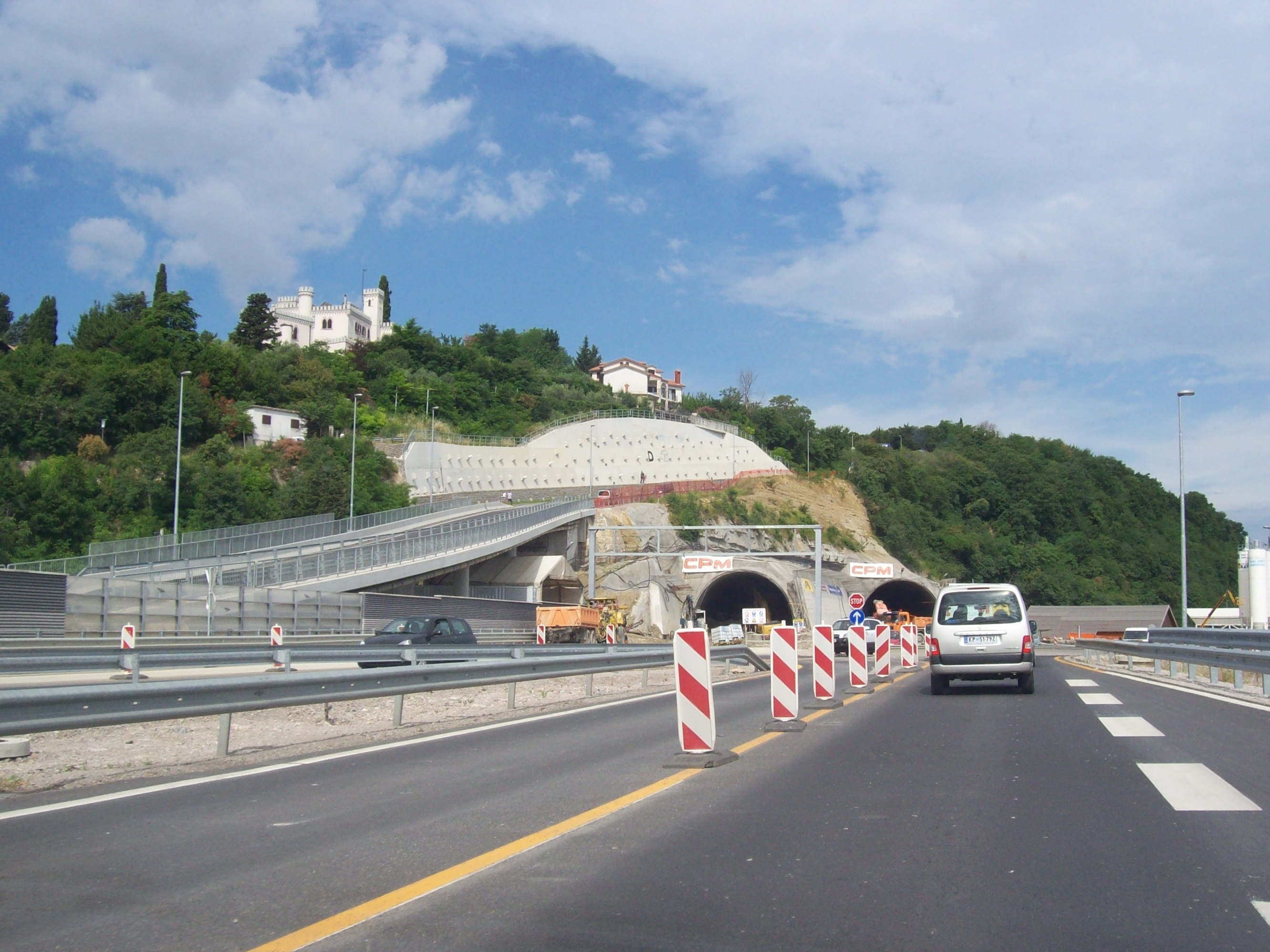 Hitra cesta H5 (Koper, 17-Jun-2010)